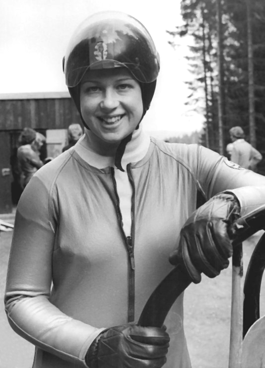 Ilona Brand ADN-ZB Schaar 21.11.1979-Igls-Österreich: Europäische Drei-Bahnen-Tournee-2. Wettkampf-Auf der Olympiabahn in Igls bei Innsbruck überraschte Ilona Brand (DDR-Foto von einem früheren Wettkampf) mit ihrem Sieg bei den Frauen. Sie war nach drei Läufen eine Tausendstelsekunde schneller als Welt- und Europameisterin Melitta Sollmann (DDR).